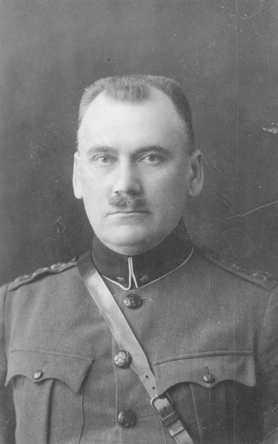 MuuseumikoguFotokoguOlemusfotoSäilivusmääramata legend Kindralmajor (24.II 1922) Lõpetas Vilno Sõjakooli al. ltn. 1901 a. Vabadussõjas 21.X 1918 2. Jalaväepolgu ülem 1918 - 1919 I Div. ülema abi 1.IV 1919 I Div. ülem 24.X 1919 Kaitseliidu ülem 29.III 1920 Tallinna Garnisoni ülem 1.X 1928 - 7.IV 1930 III div. ülem Teenistuskiri: Polkovnik (20.X 1916) Al. polk. (15.VIII 1915) Kapten (1.IX 1913) St. kapt. (1.IX 1909) Ltn. (1.IX 1905) Autasud: VR I/2; III/2 ("Sõdur" 1927, lk 37; "Sõdur" 1930, lk 358) Fotograaf teadmata Repro Jüri Karm kommentaar Fk 2625:1 - 109 Fotod Eesti Vabariigi (1918 - 1940) Kaitseväe, Kaitseliidu, Naiskodukaitse ja Noorkotkaste liikmeskonnast, valdavalt portreefotod. Fotod saadi ümberpildistuseks Eesti Kaitseliidu Muuseumi juhatajalt Olavi Pungalt, kes abistas ka fotode legendeerimisel Andis üle ERMi arhivaar Jana Reidla. v.v. akt ?